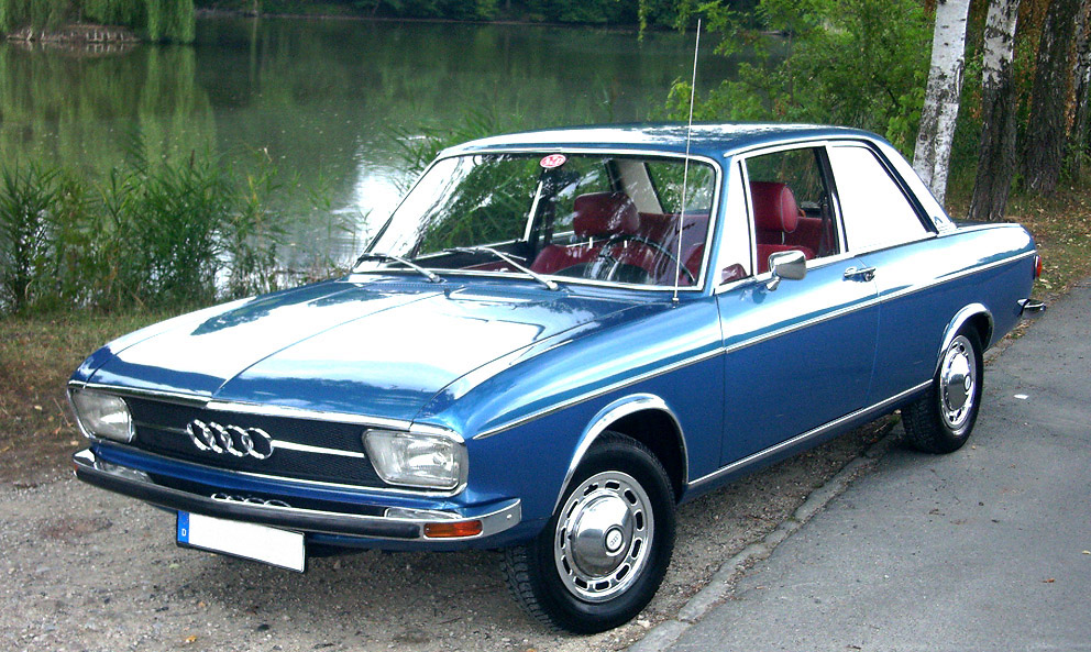 Audi 100 LS, zweituerer, Baujahr 1973